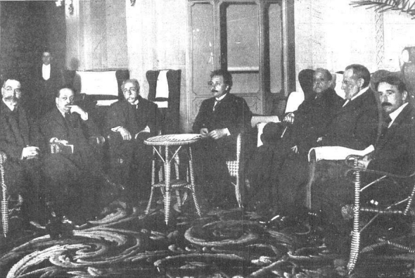 El profesor Einstein, con el rector de la Universidad de Madrid y catedráticos de dicho Centro, durante la visita que hizo al claustro de profesores el dia de su llegada. publicada en la revista Mundo gráfico el 7/03/1923 Página 13.